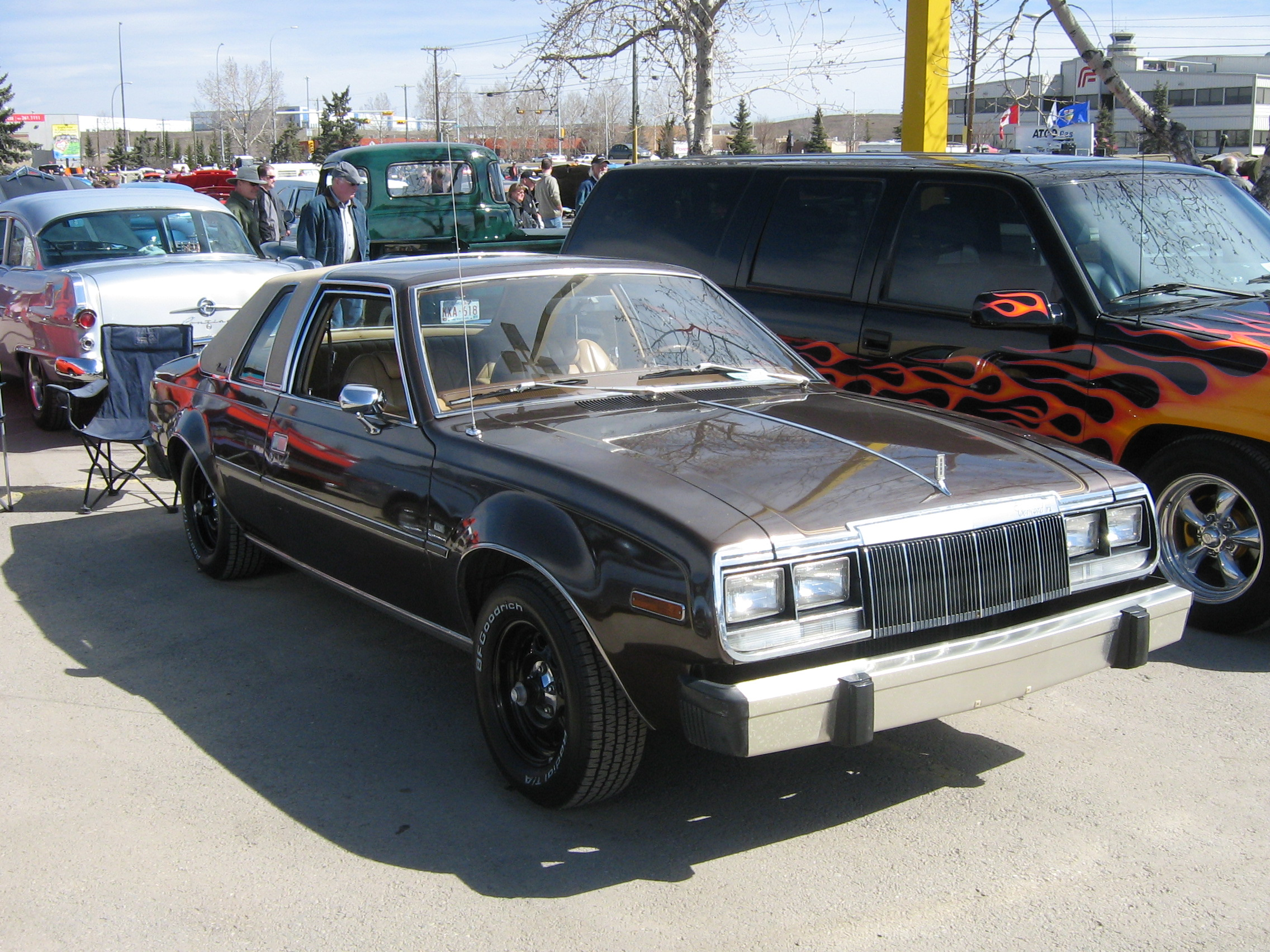 AMC